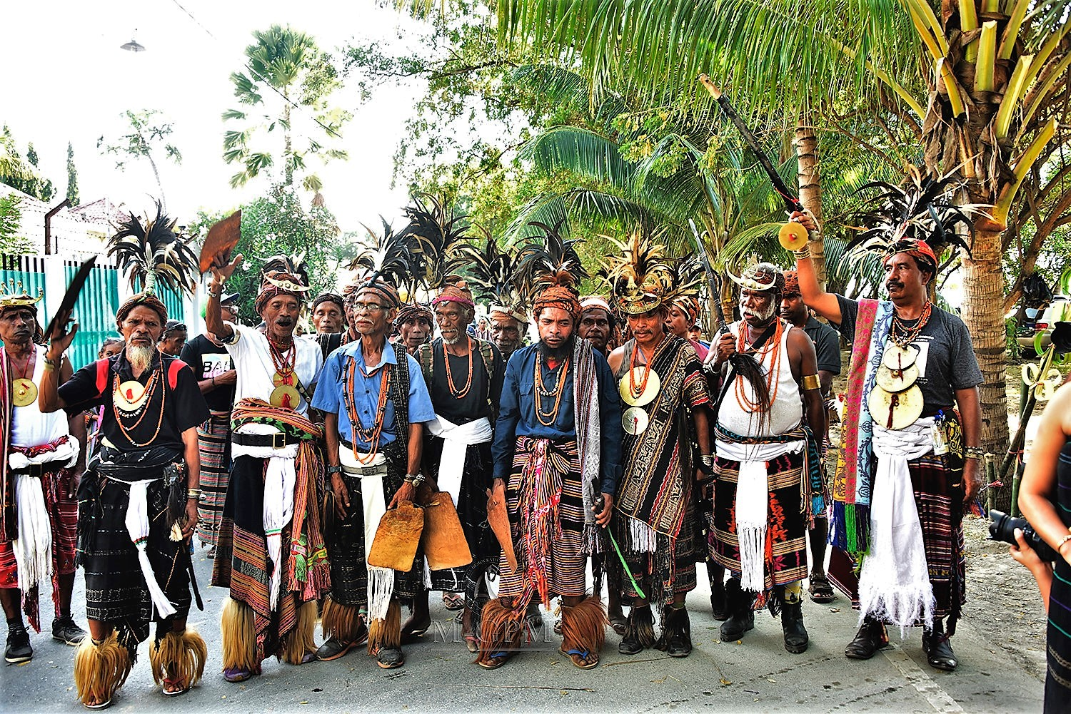 Älteste aus allen Gemeinden Osttimors, als Vertreter bei einer traditionellen Zeremonie in der Landeshauptstadt Dili